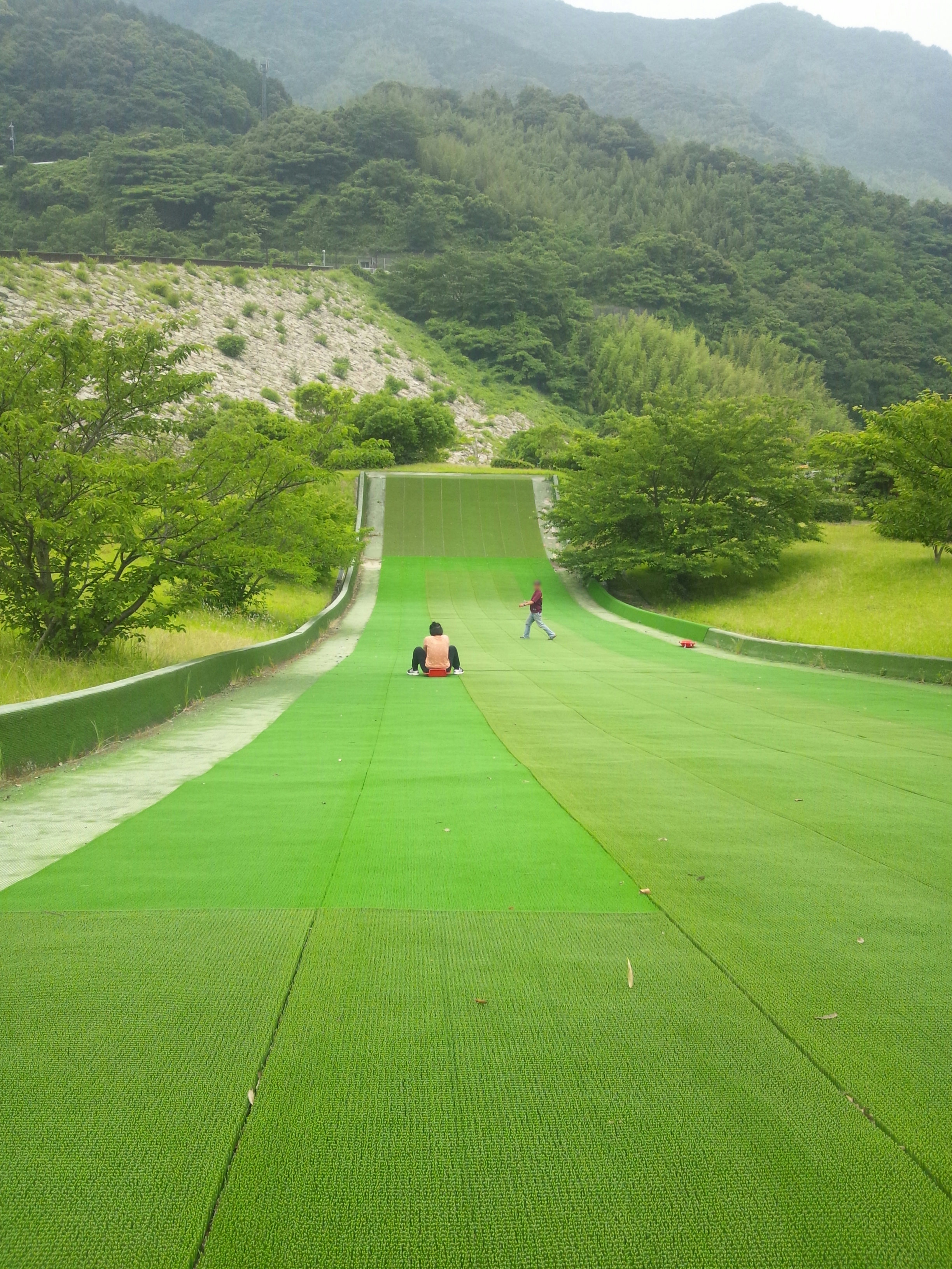 屋代ダムのチビッコゲレンデ